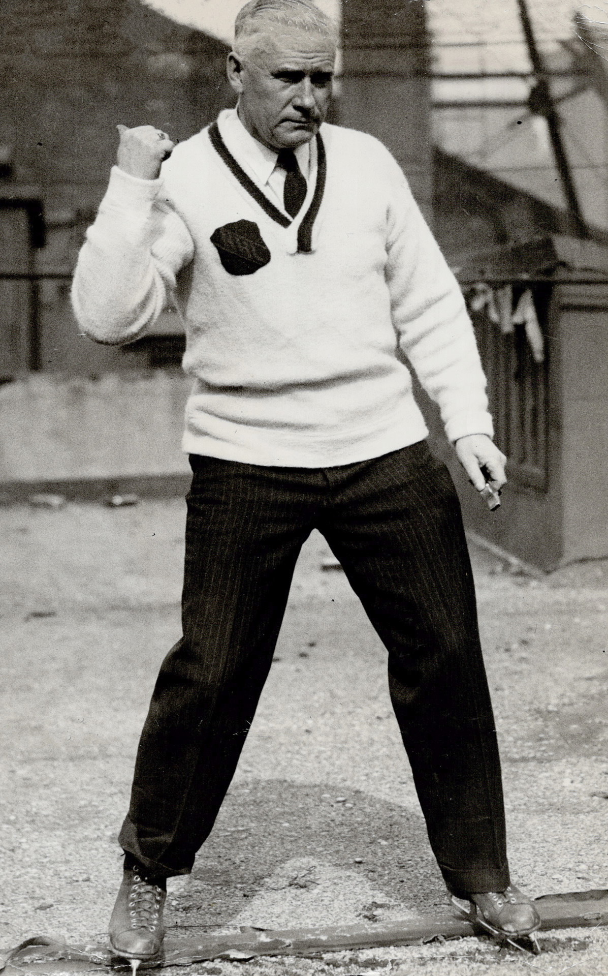 Lou Marsh